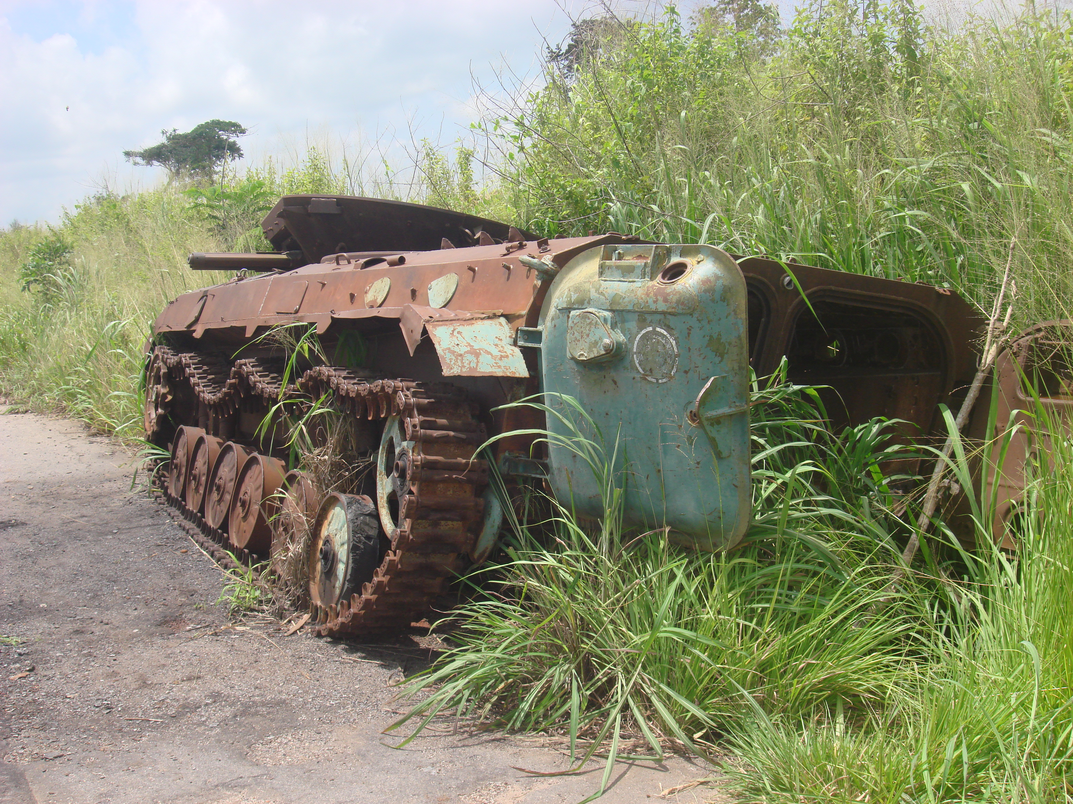 Vestiges d'un char des Forces armées nationales de Côte d'Ivoire (FANCI) près Bonoufla (Vavoua, centre-ouest de Côte d'Ivoire)